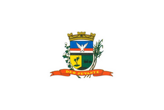 Bandeira de Elias Fausto - SP - Brasil.